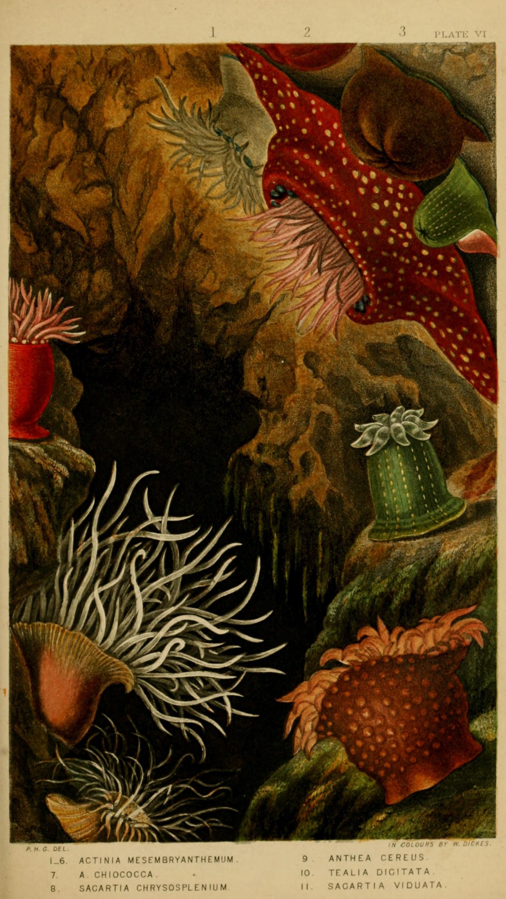 1.-6. Actinia mesembryanthemum, 7. A. chiococca (A. equina), 8. Sagartia chrysosplenium, 9. Anthea cereus, 10. Tealia digitata, 11. Sagartia viduata